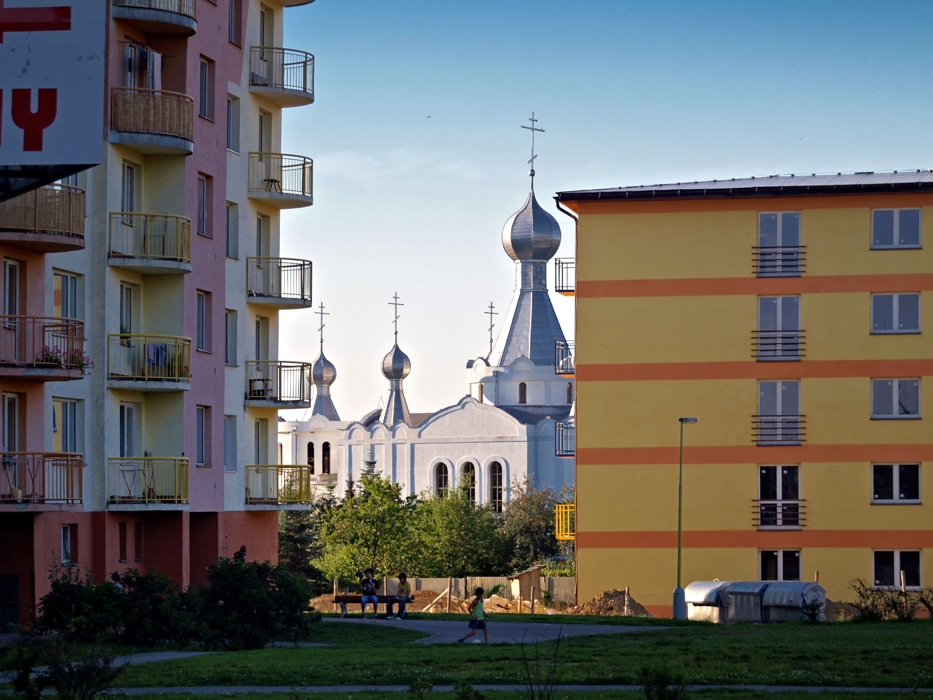 Stropkov (Slovakia) - Clochers de l'église orthodoxe russe